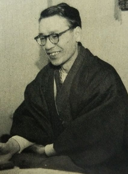 力武常次